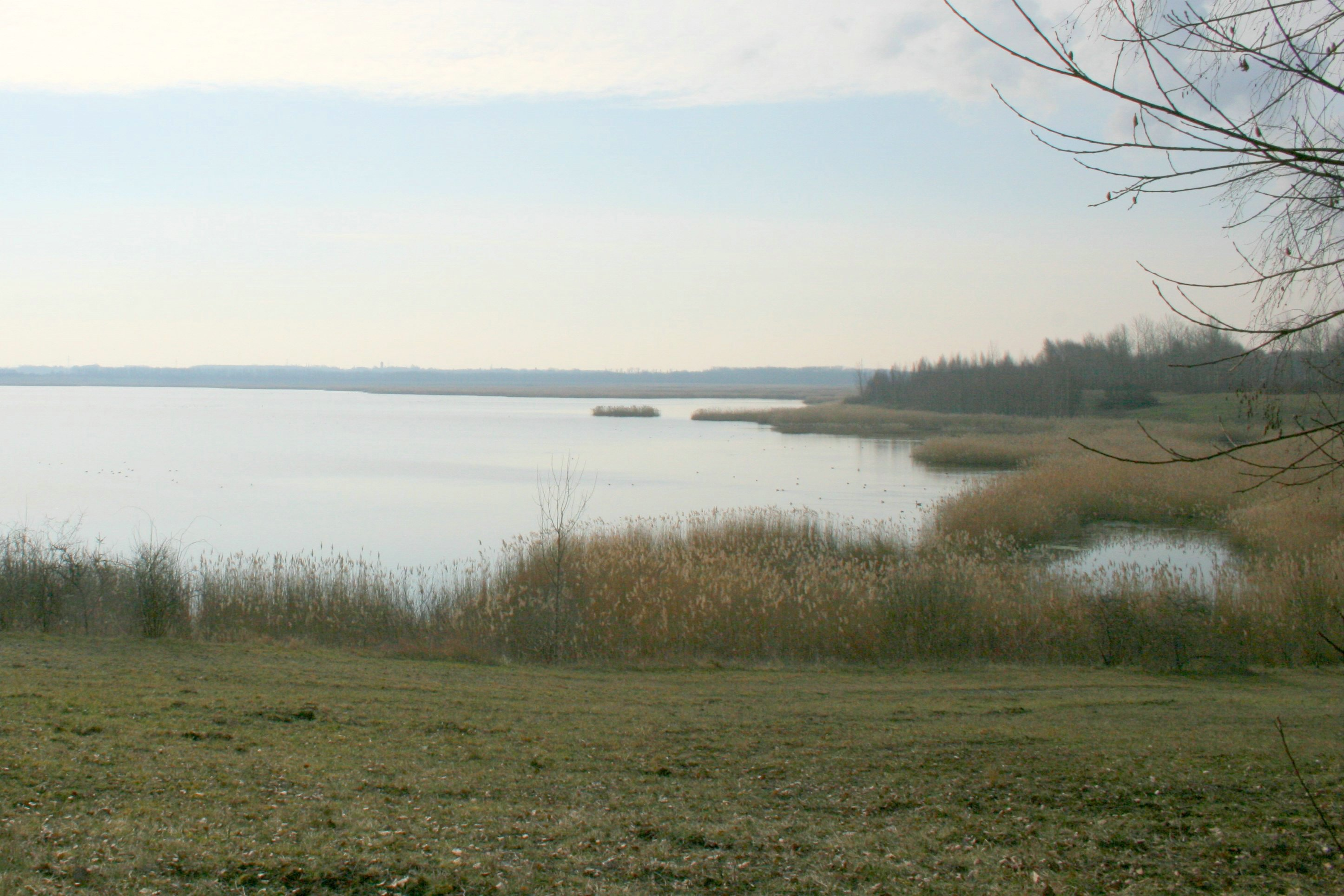 Rückhaltebecken Stöhna